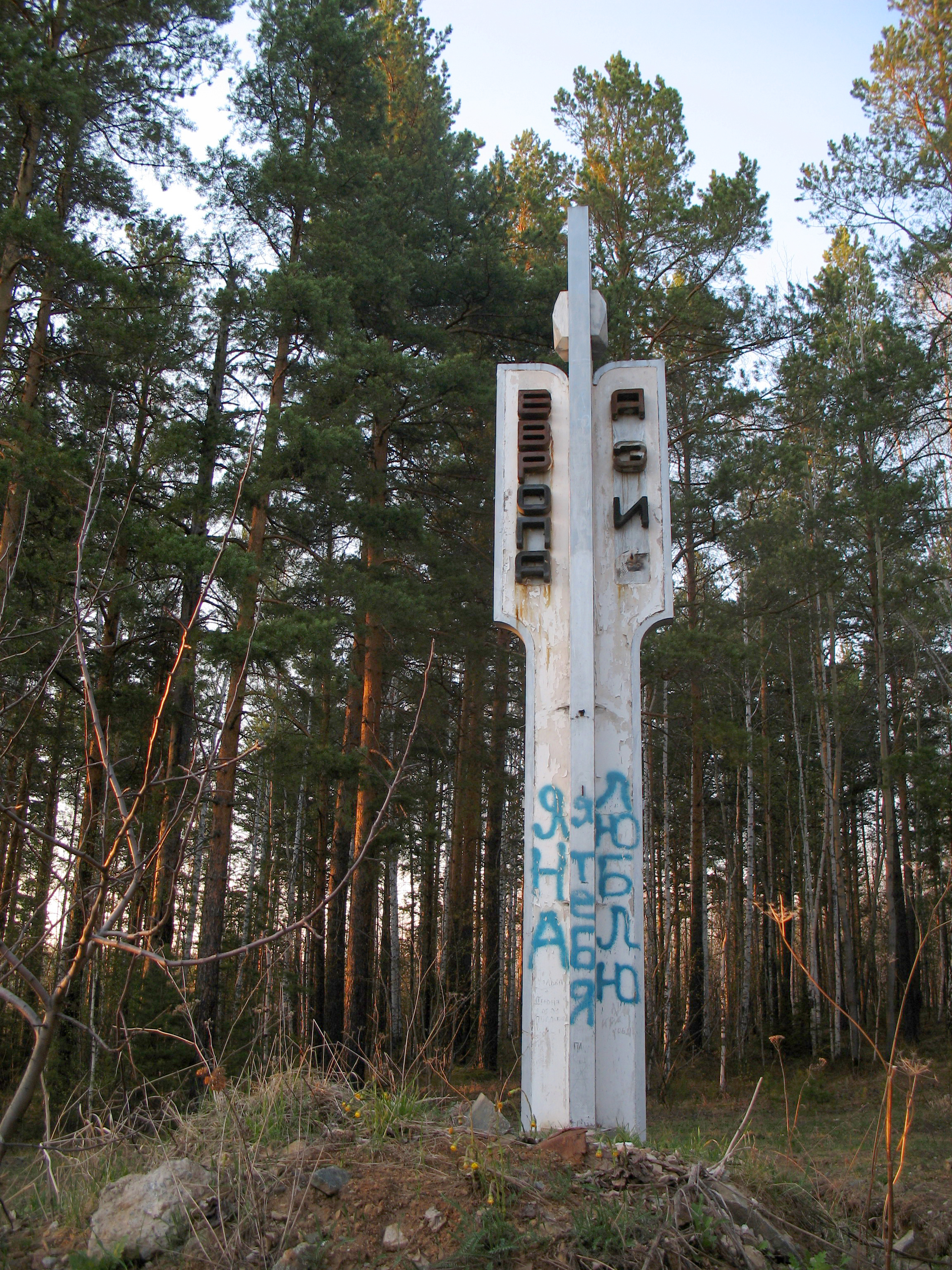 Обелиск между городами Ревда и Дегтярск Свердловской области